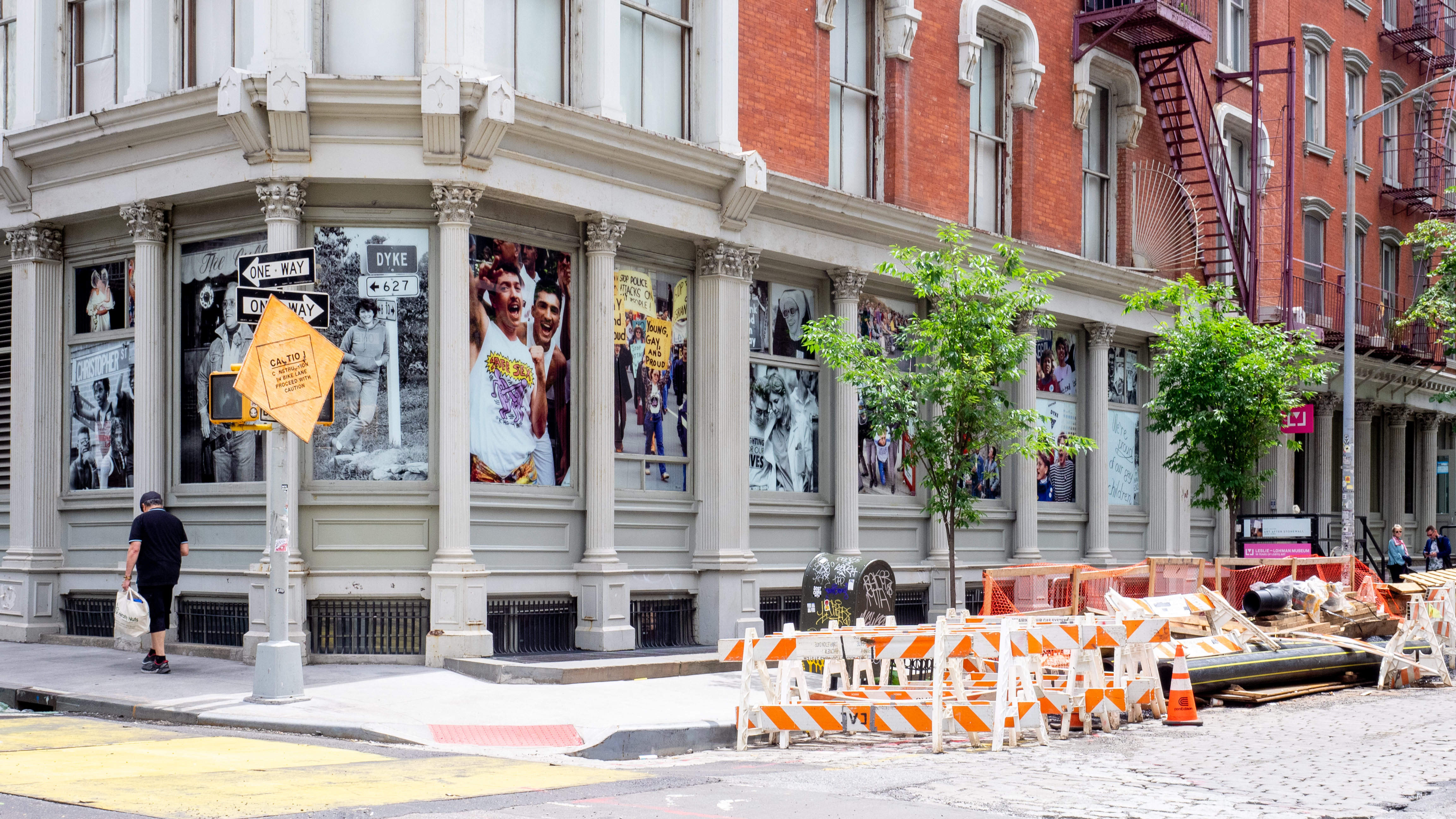 SoHo, NYC